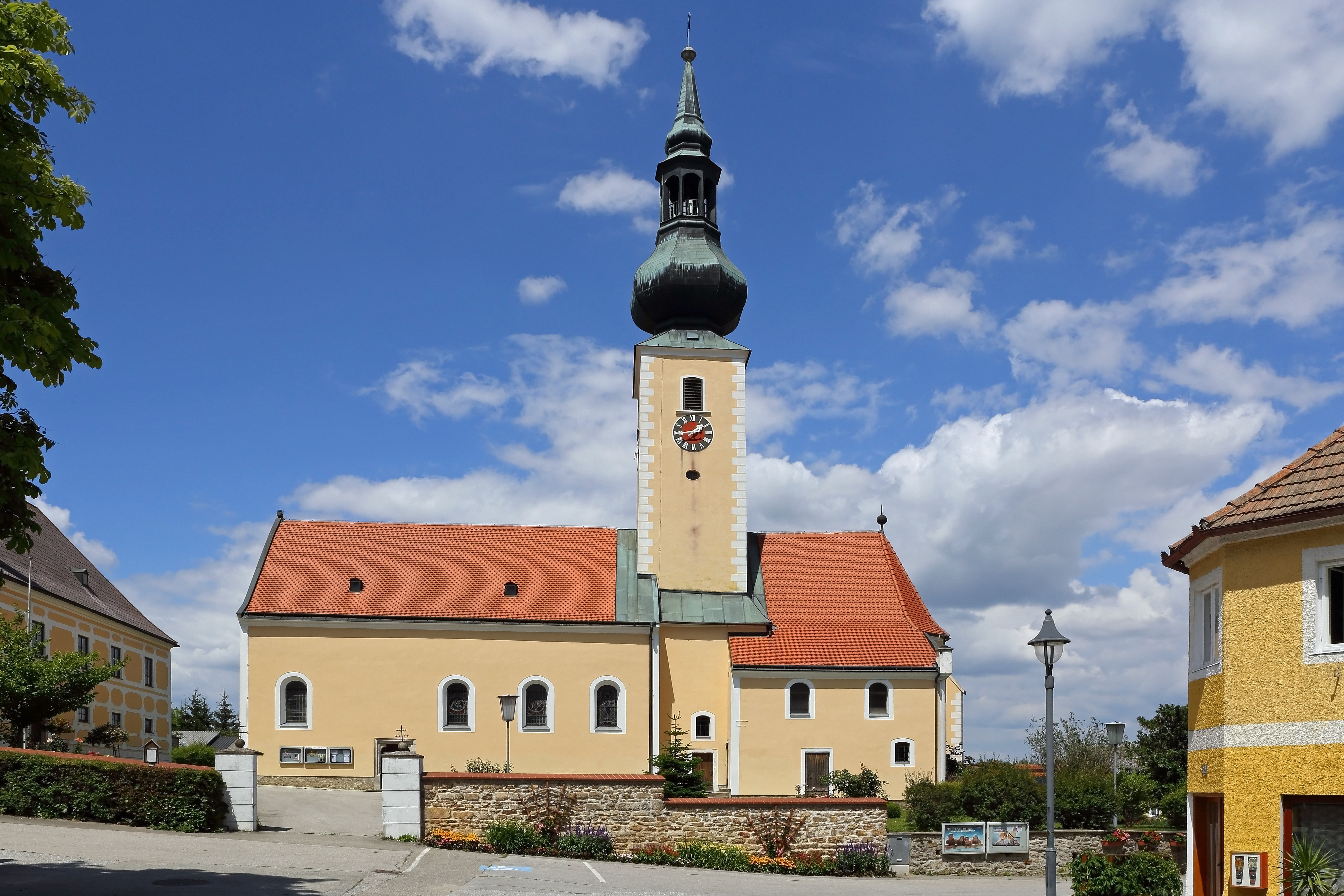 Die ursprünglich romanische Kirche wurde im 15. Jahrhundert durch einen spätgotischen Chor und den Einbau einer Halle verändert. Das Altarblatt am spätbarocken Hochaltar stammt von Martin Johann Schmidt.